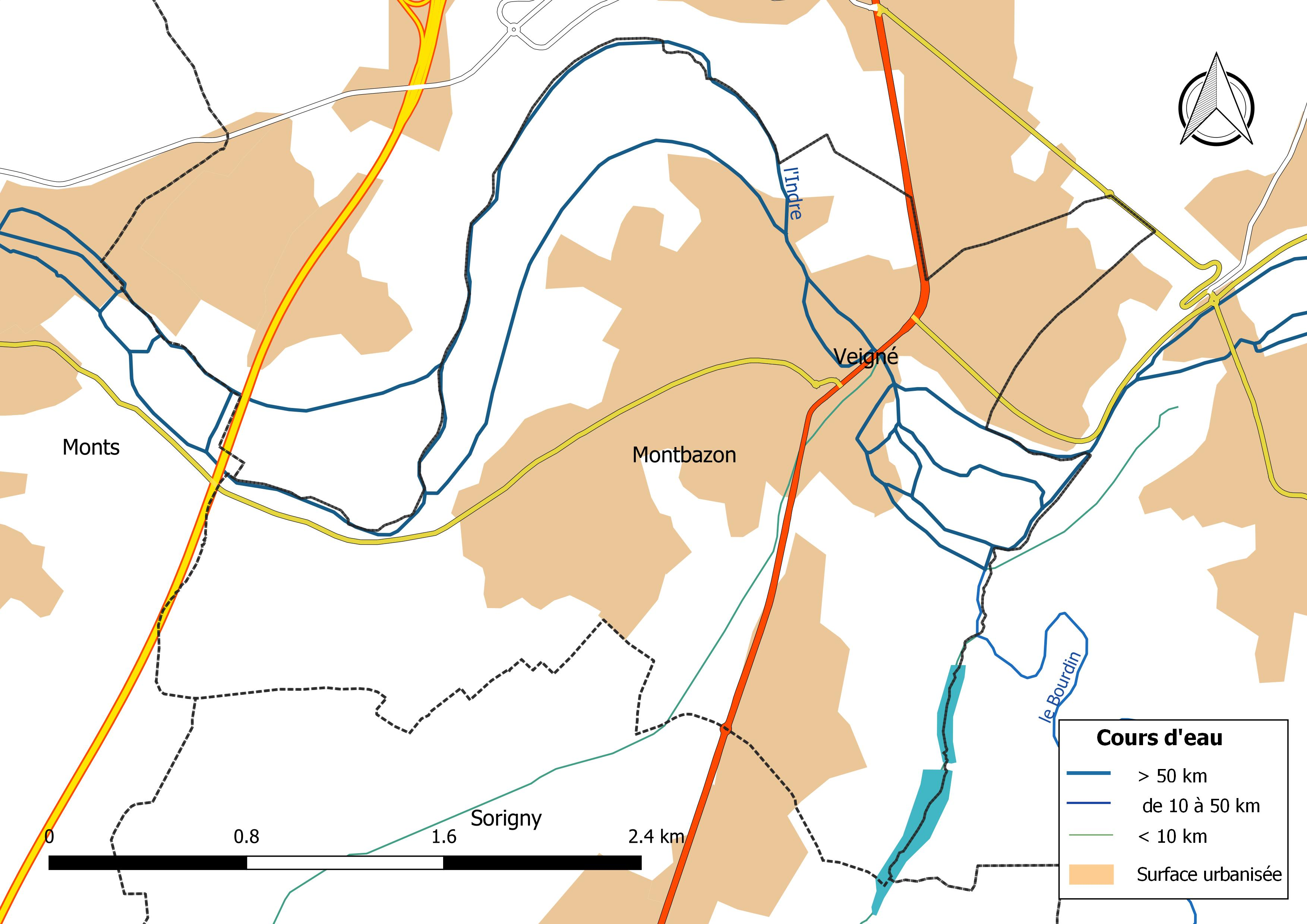 Carte du réseau hydrographique de la commune de Montbazon (France).